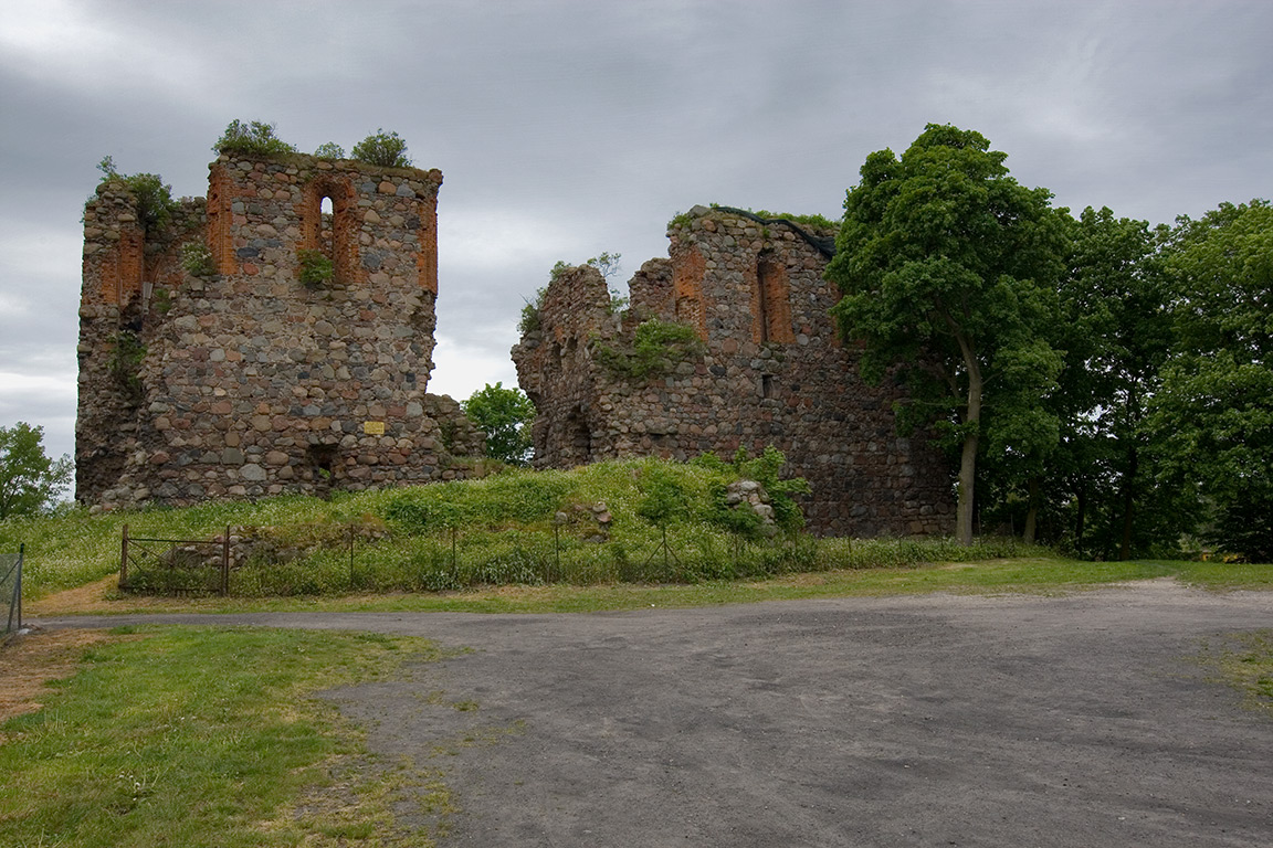 Papowo Biskupie - zamek pokrzyżacki w ruinie, powstały w latach 80. XIII wieku. Od 1505 do 1772 z nadania króla Aleksandra Jagiellończyka własność biskupów chełmińskich